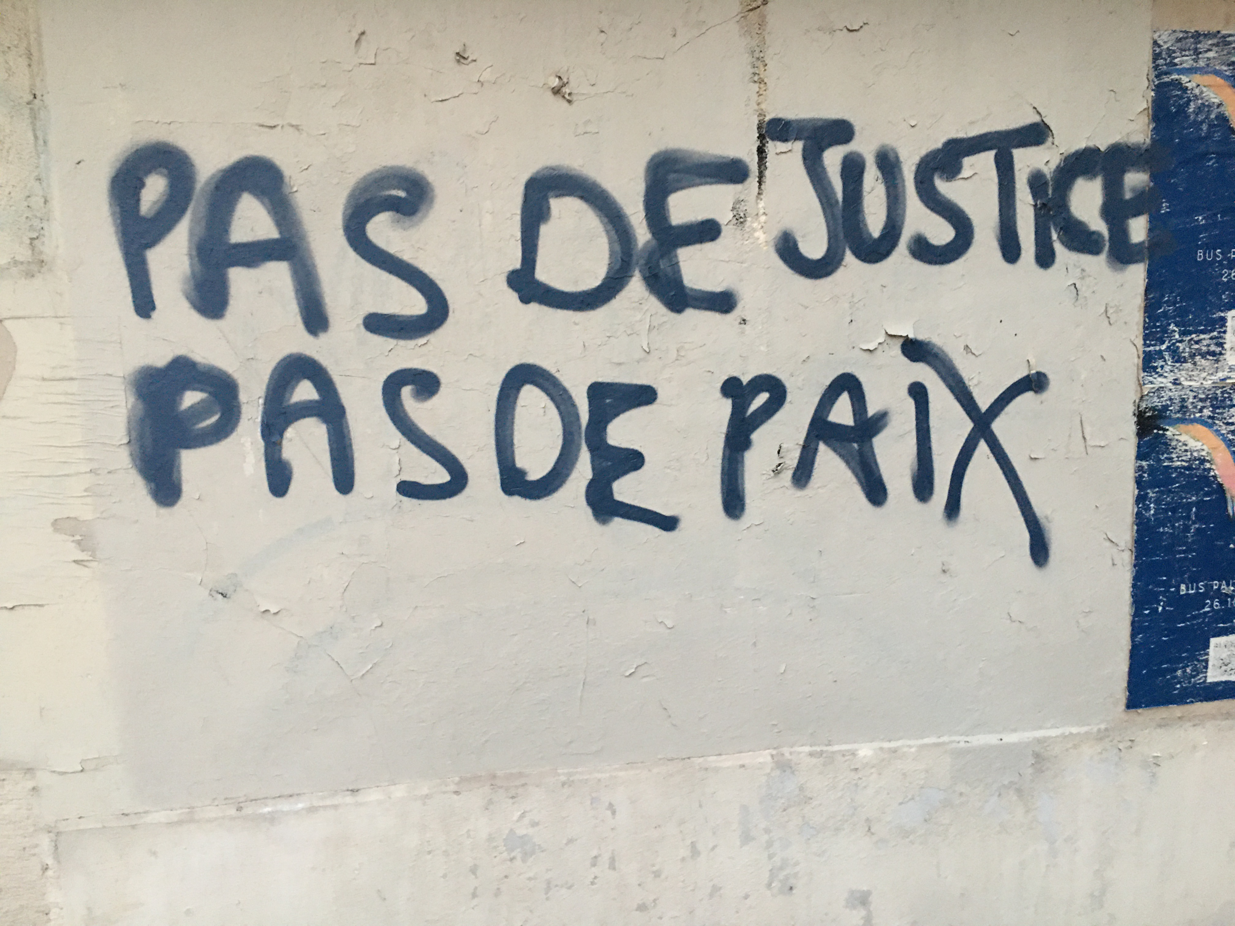 Paris Batignolles 2 juin 2020 Slogan sur mur pour Adama Traoré et George Floyd